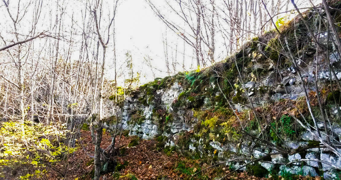 Niyalqala